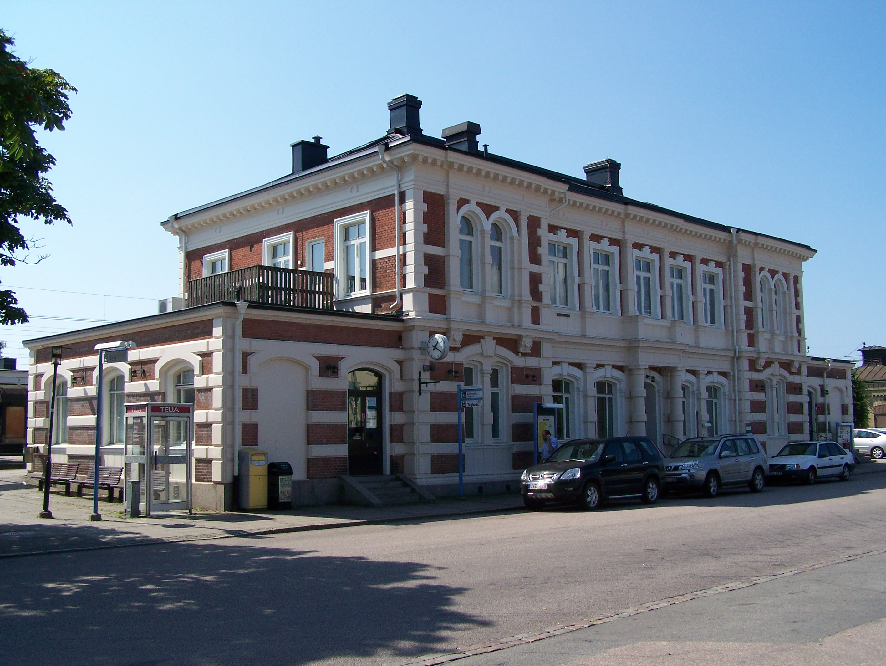 Falkenbergs järnvägsstation/Falkenberg Station